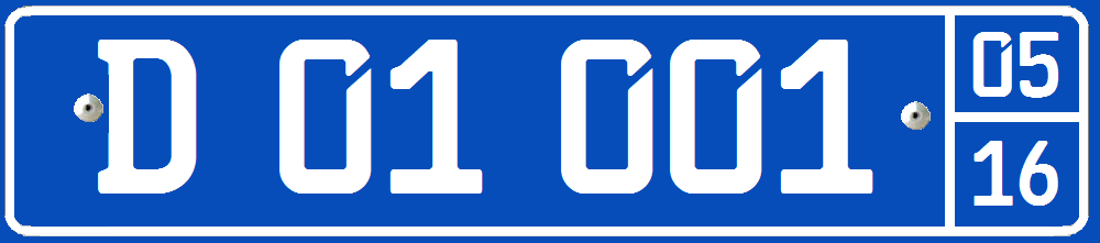 پلاک جدید جمهوری قرقیزستان